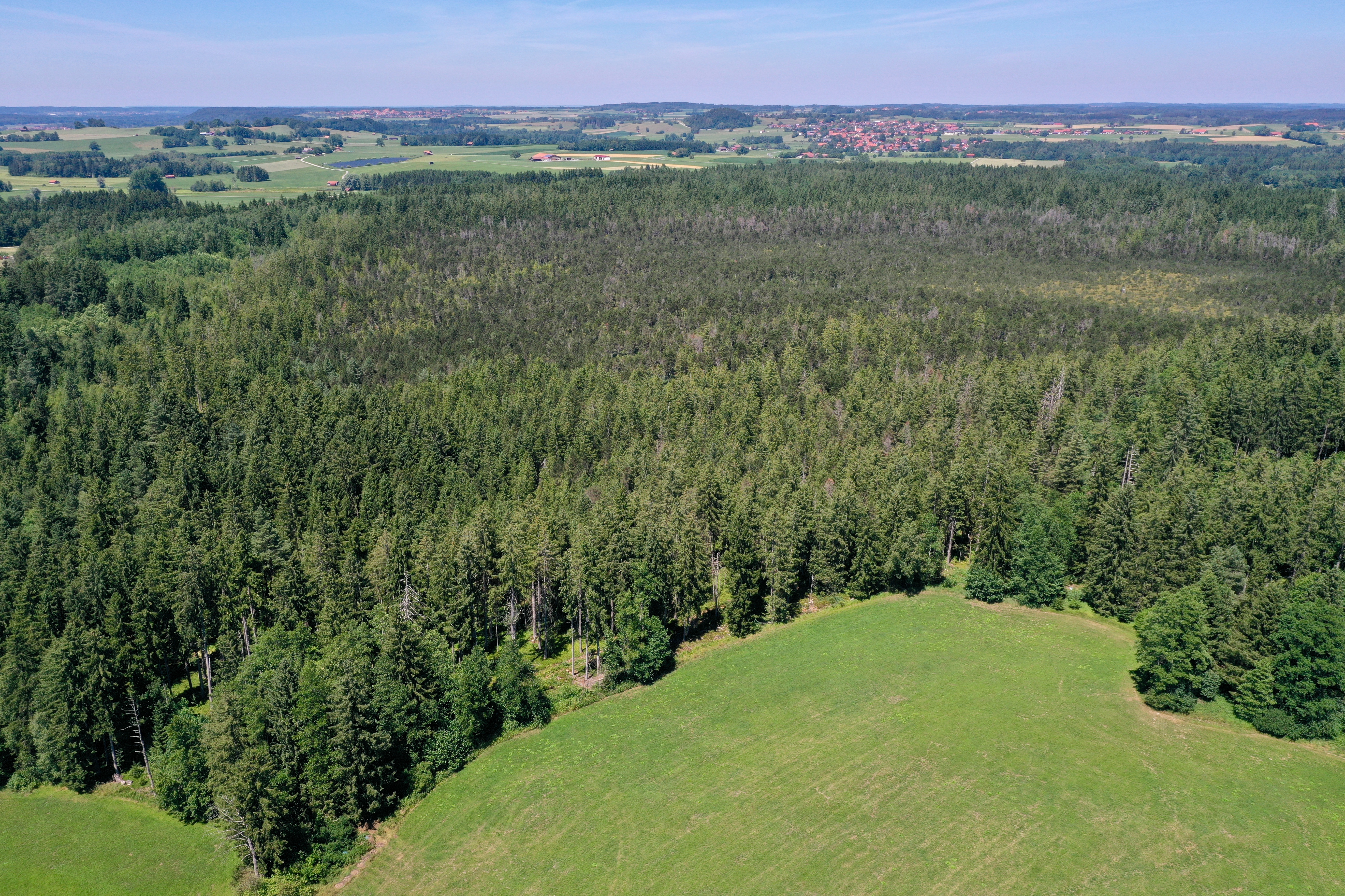 Das Naturschutzgebiet Schwaigwaldmoos von der Luft aus gesehen.